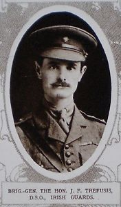 John Trefusis